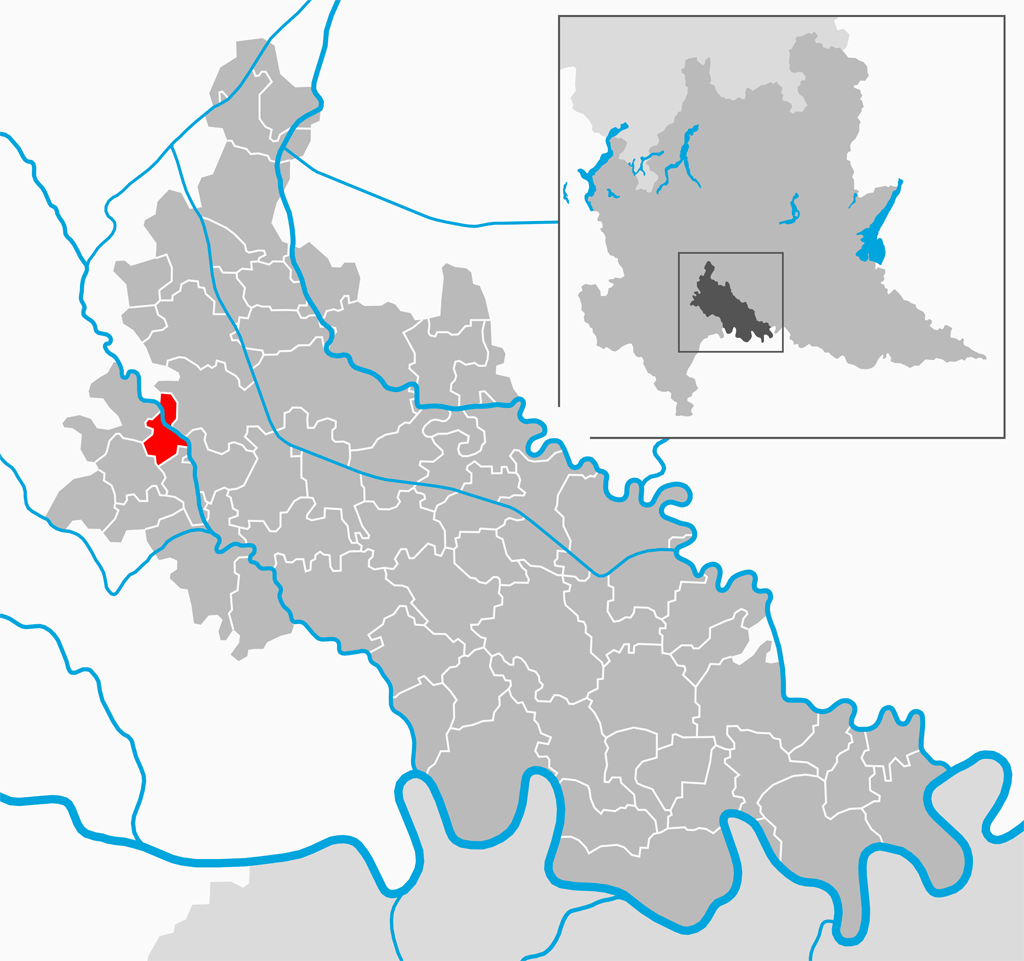 Il comune di Salerano sul Lambro nella provincia di Lodi